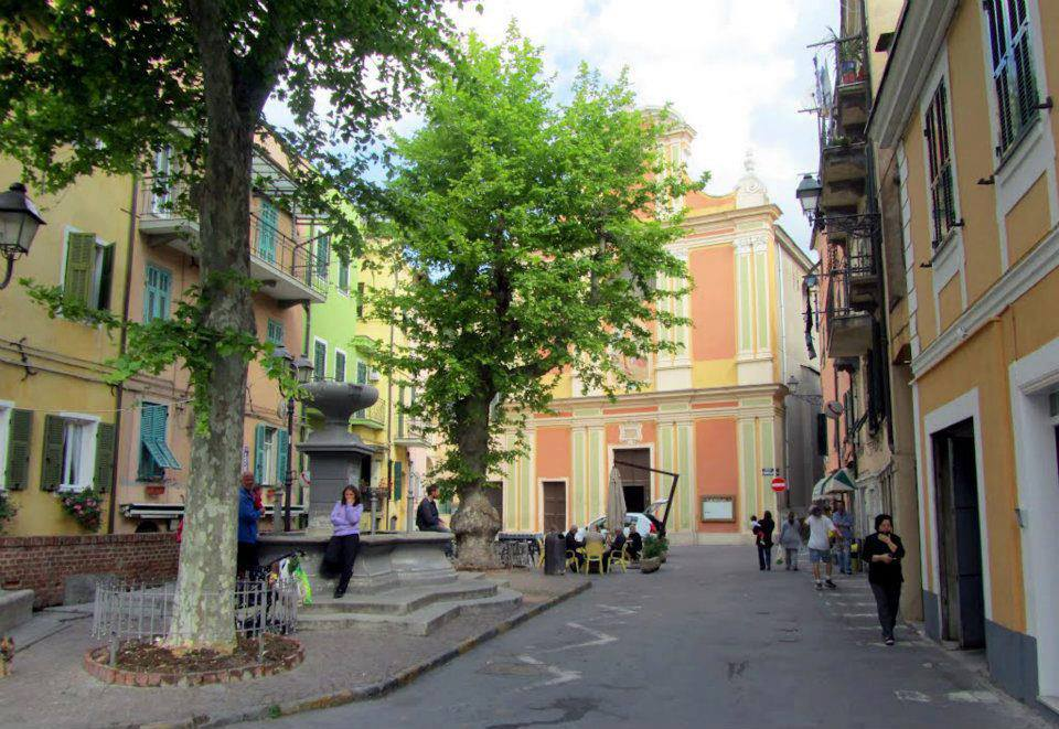 Piazza San Sebastiano come si presenta ai giorni nostri.